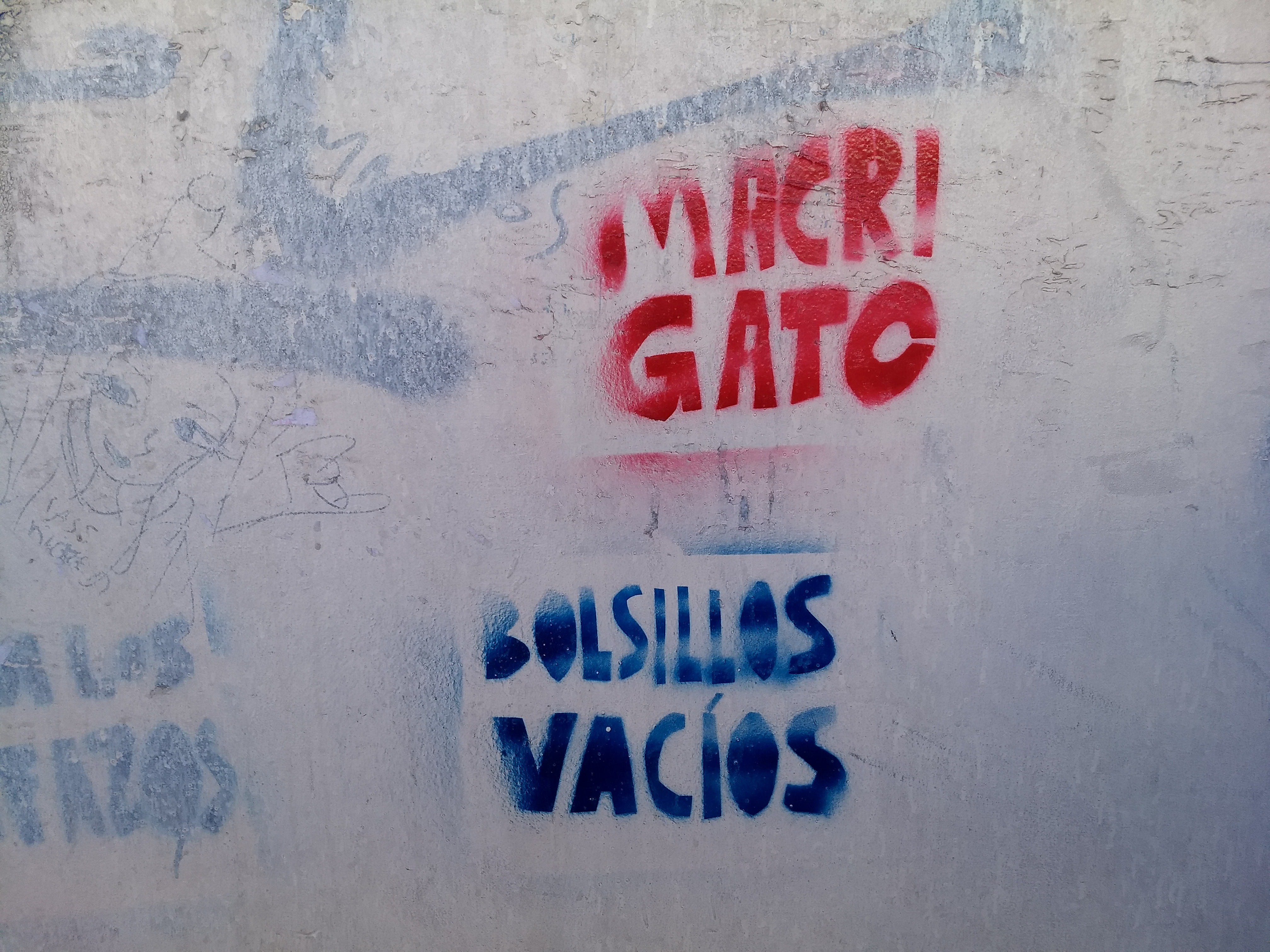 Graffiti hecho con stencil en una de las salidas del túnel peatonal de la estación Ramos Mejía del ferrocarril Sarmiento.